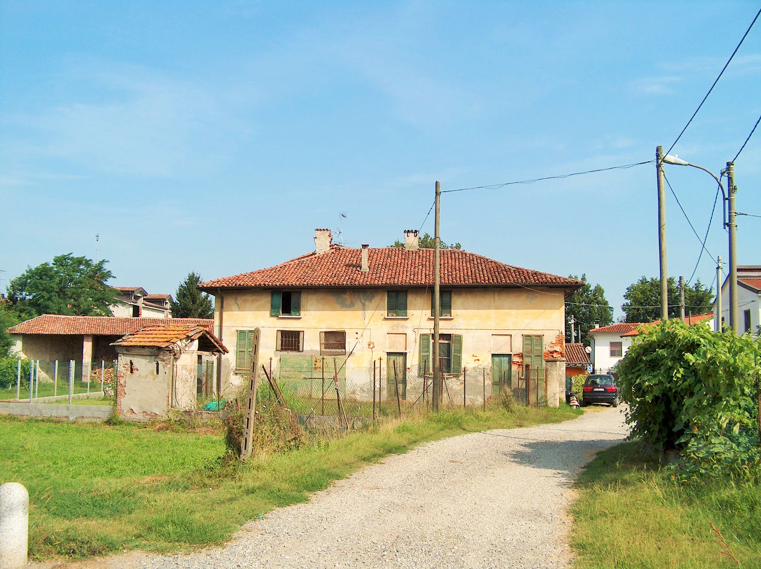 Brembio. Frazione Cà de Folli. L'edificio delle ex Scuole rurali.